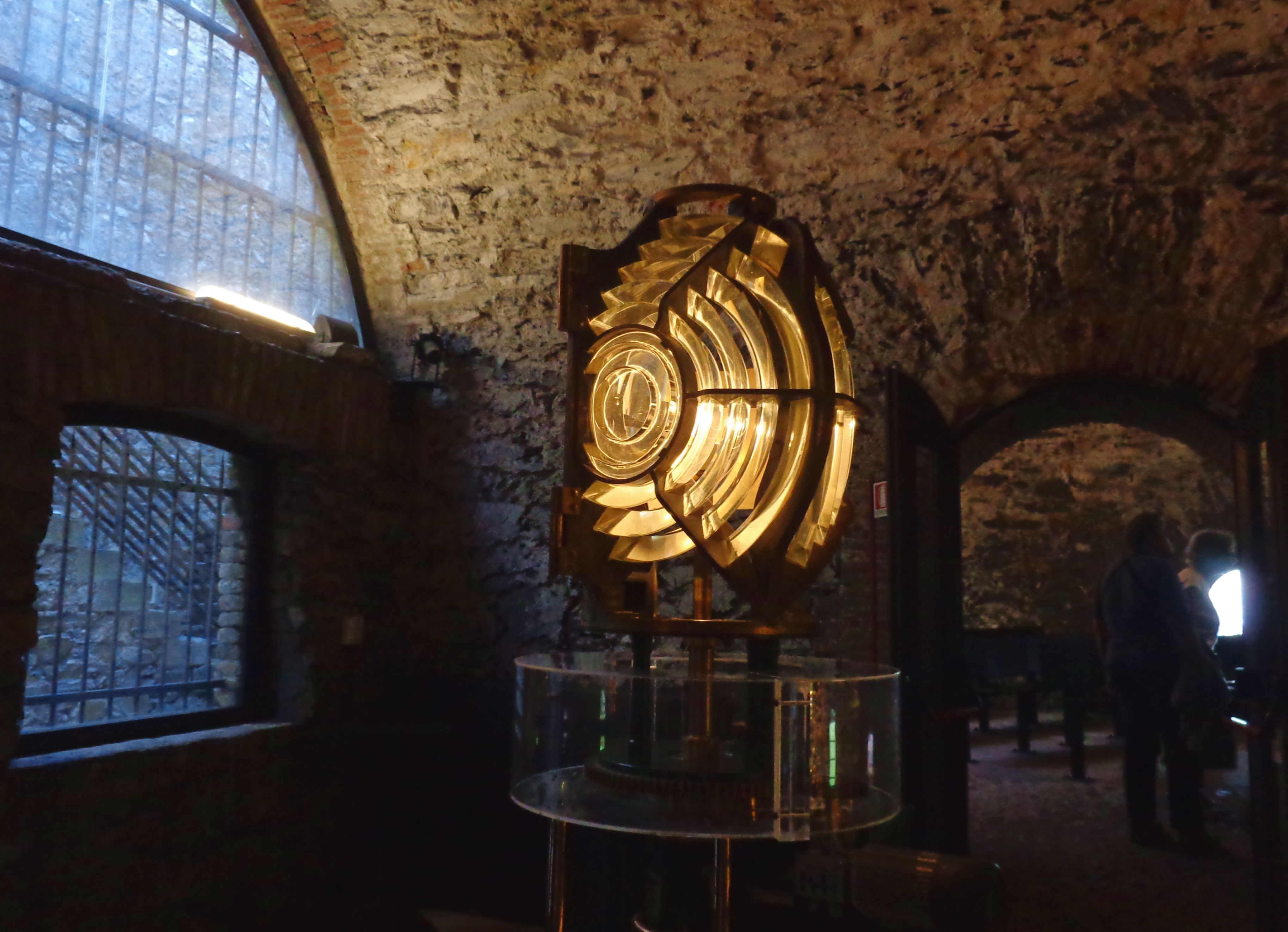 Torre della Lanterna This is a photo of a monument which is part of cultural heritage of Italy.